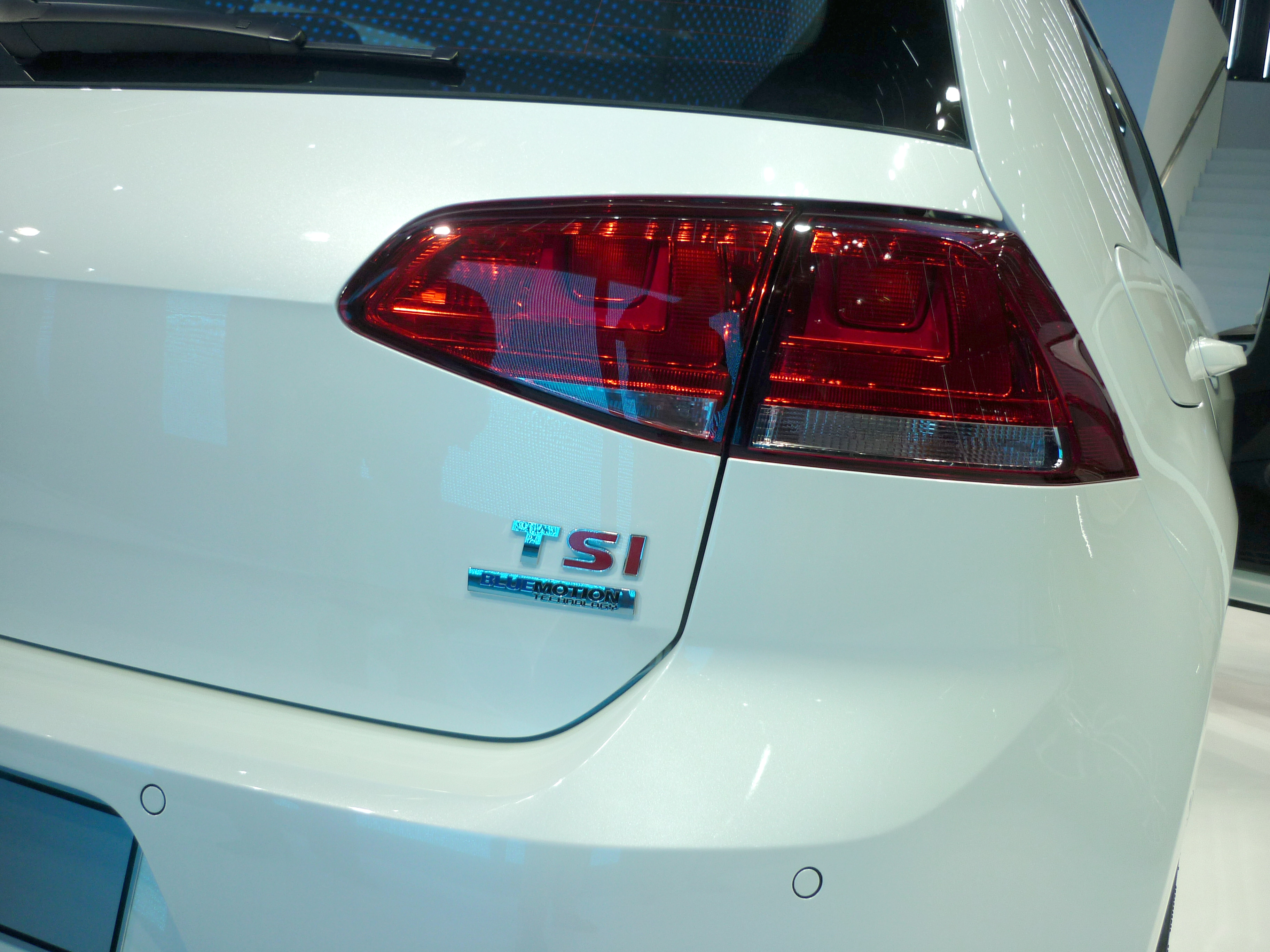 Autostadt Wolfsburg